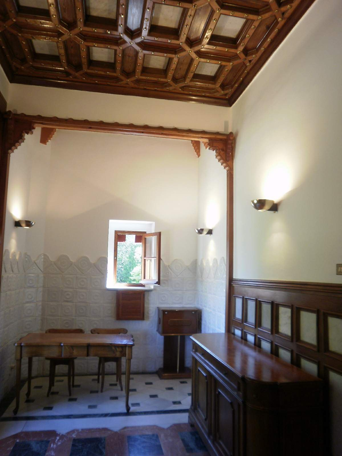 Capricho de Gaudí (Comillas)